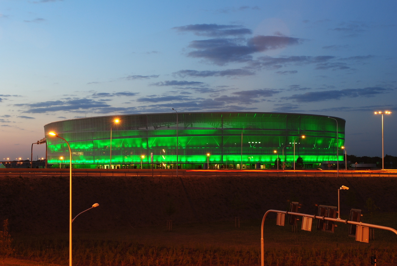 Stadion Miejski we Wroclawiu - testy iluminacj